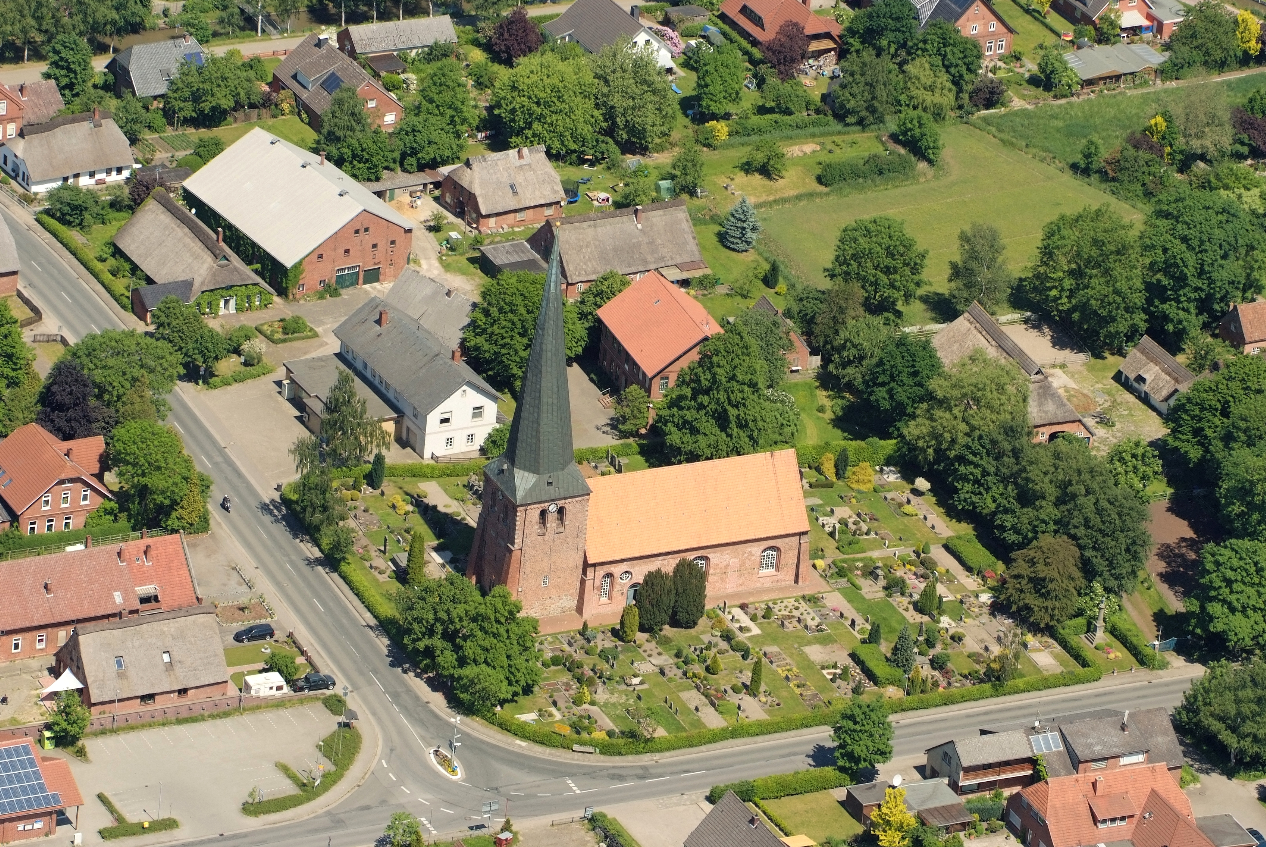 St.-Johannis-Kirche in Sandstedt Fotoflug vom Flugplatz Nordholz-Spieka über Cuxhaven und Wilhelmshaven